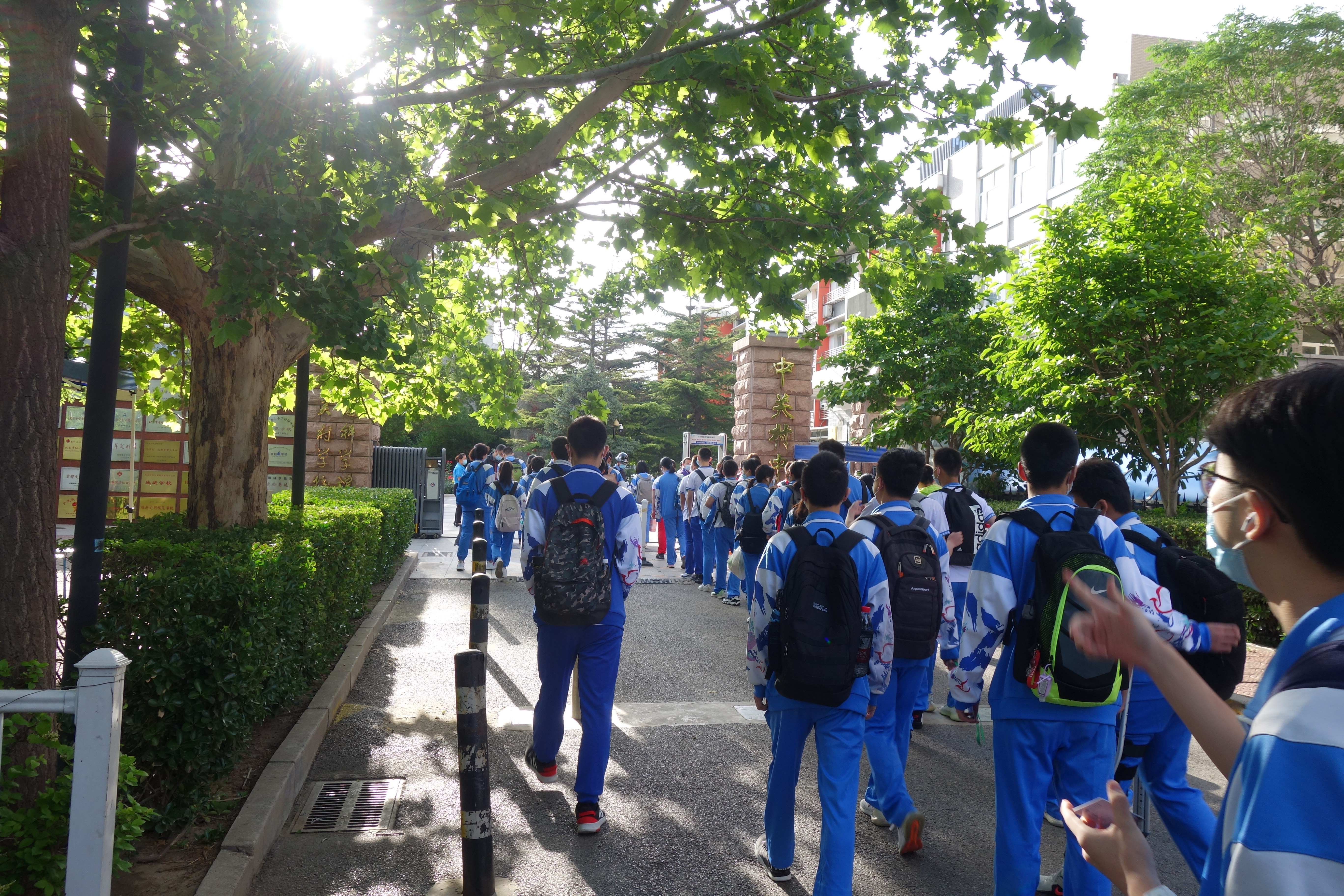 中文（中国大陆）: 受新冠疫情影响，北京市中关村中学2020年6月1日复课后采取定点开校门措施。